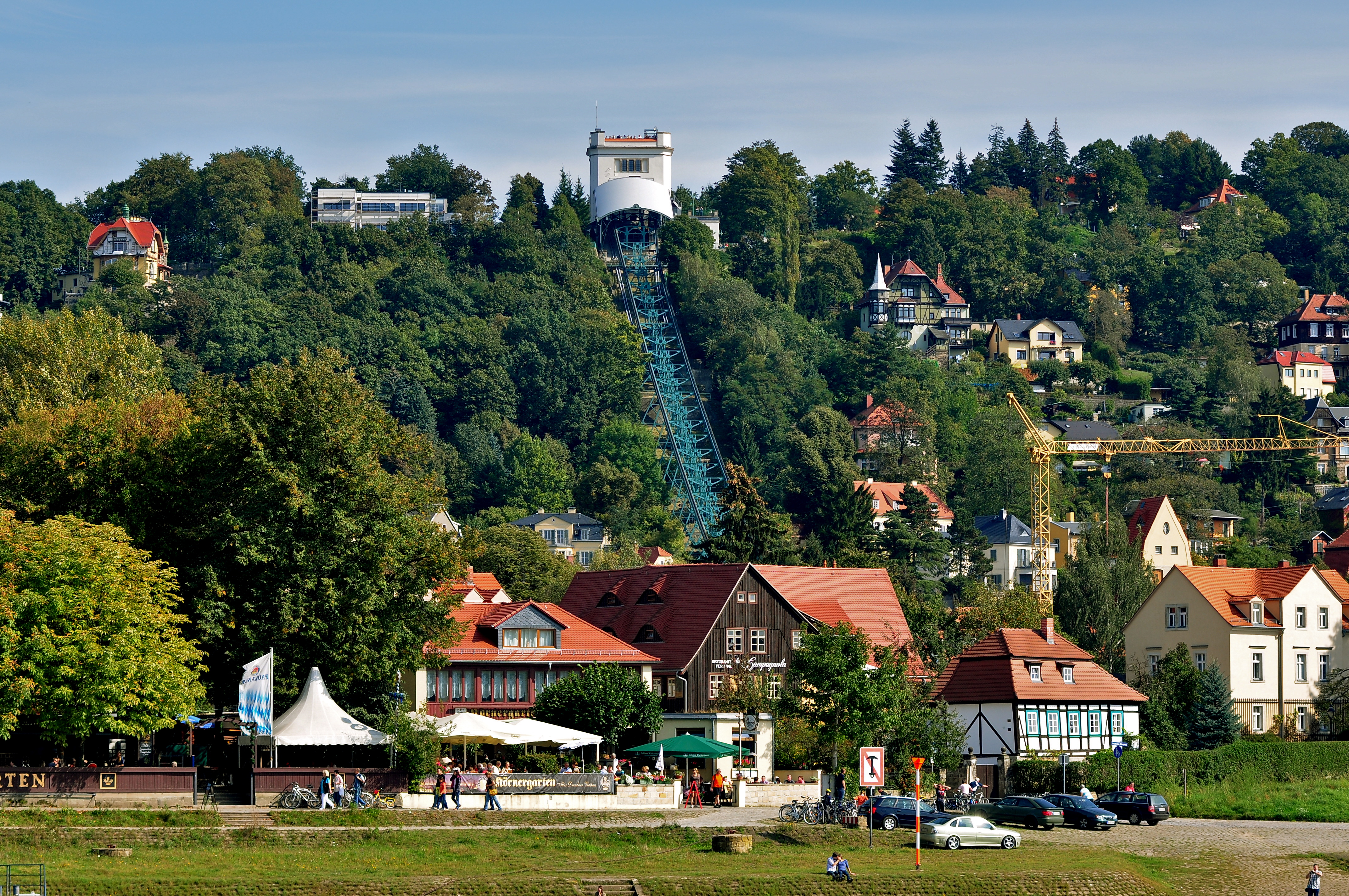 Schwebebahnanlage in Dresden-Loschwitz